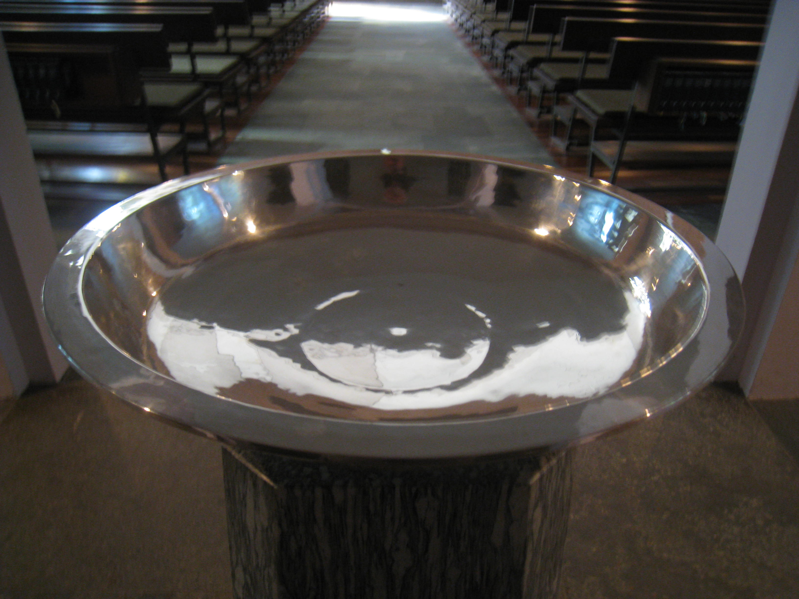 Taufstein aus Gneis, Schale aus Silber